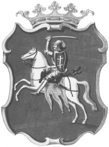 Беларуская (тарашкевіца): Герб Менскага ваяводзтва (Miensk) з Пагоняй (Pahonia)